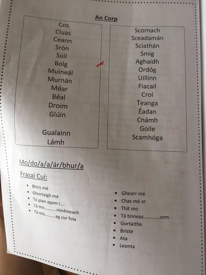 bileog oibre a úsáideann na daltaí